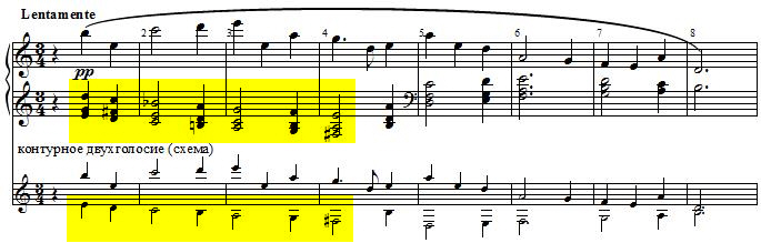 Линеарные аккорды. Пример использования (Прокофьев. Мимолетность № 1, фрагмент)